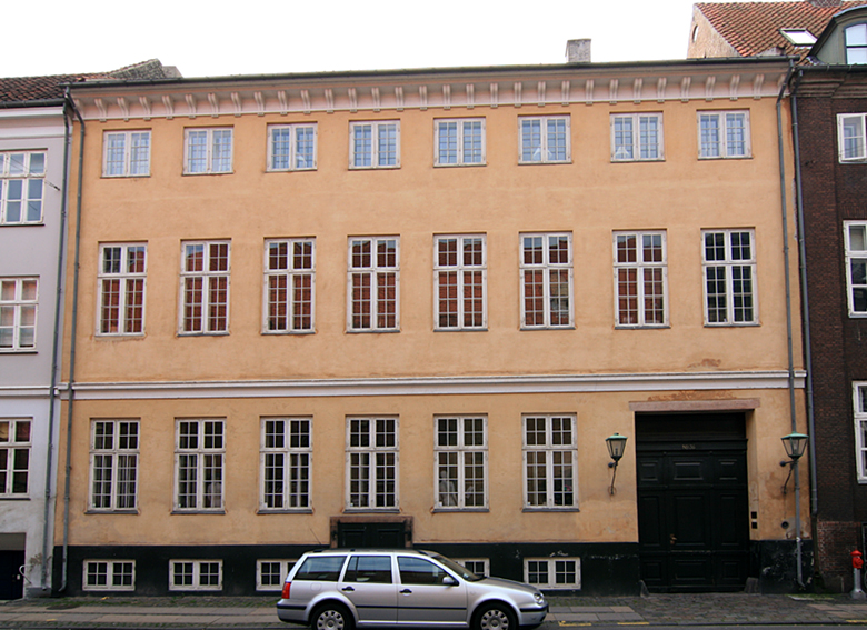 Niels Brocks Gård, Strandgade 36, København. Bygget ca. 1780. Fredet.